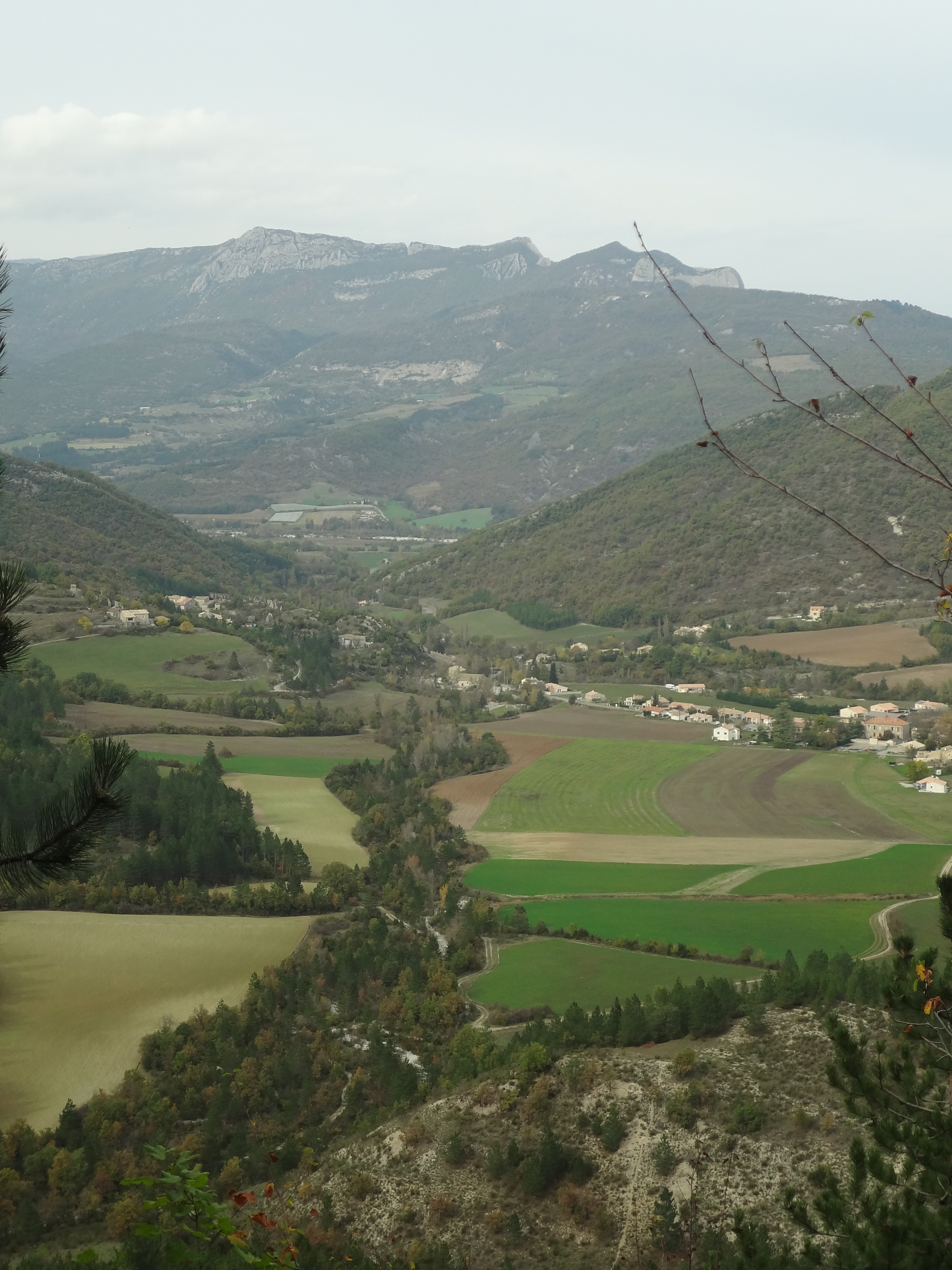 Champs cultivés en vallée et pentes basses